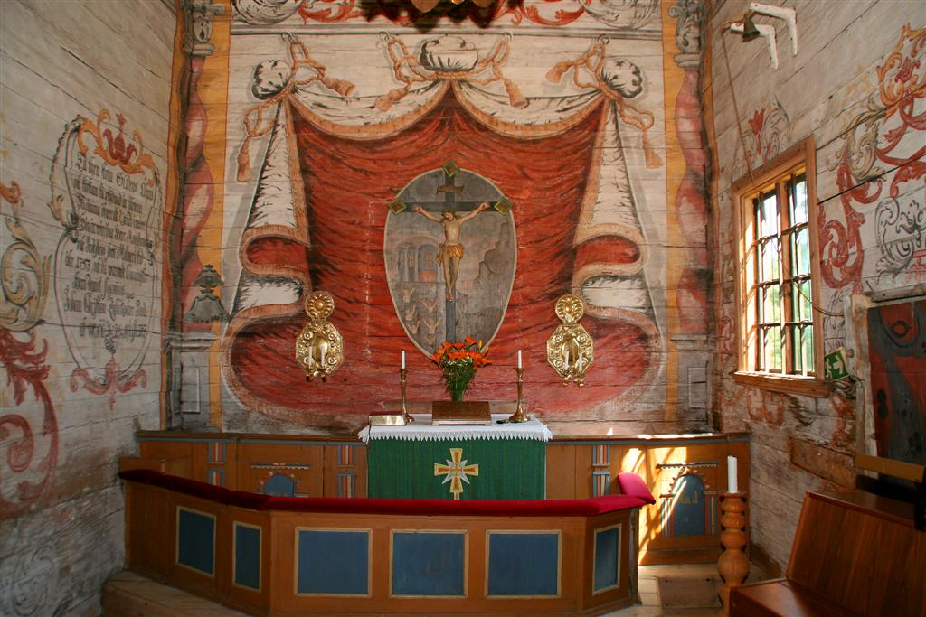 Foto: Tor Svensson